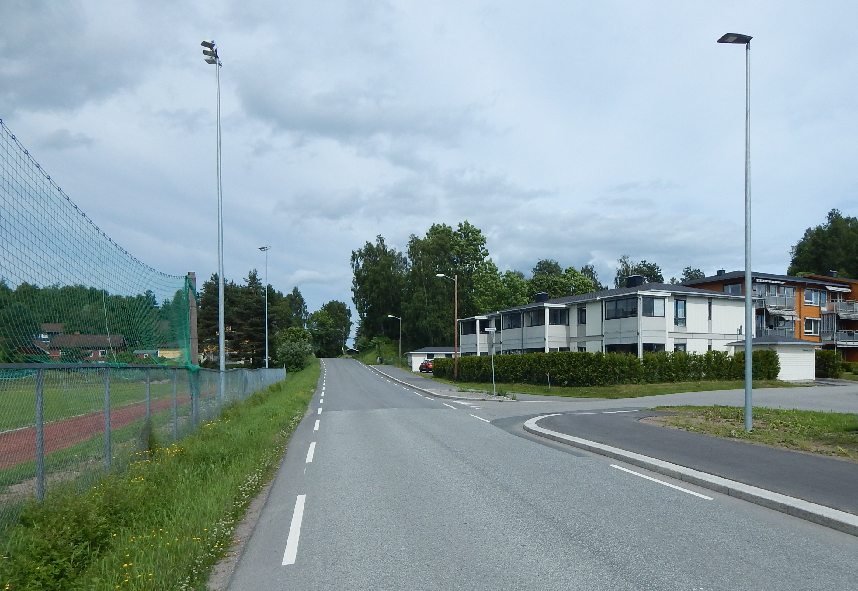 Egnervegen i Lørenfallet